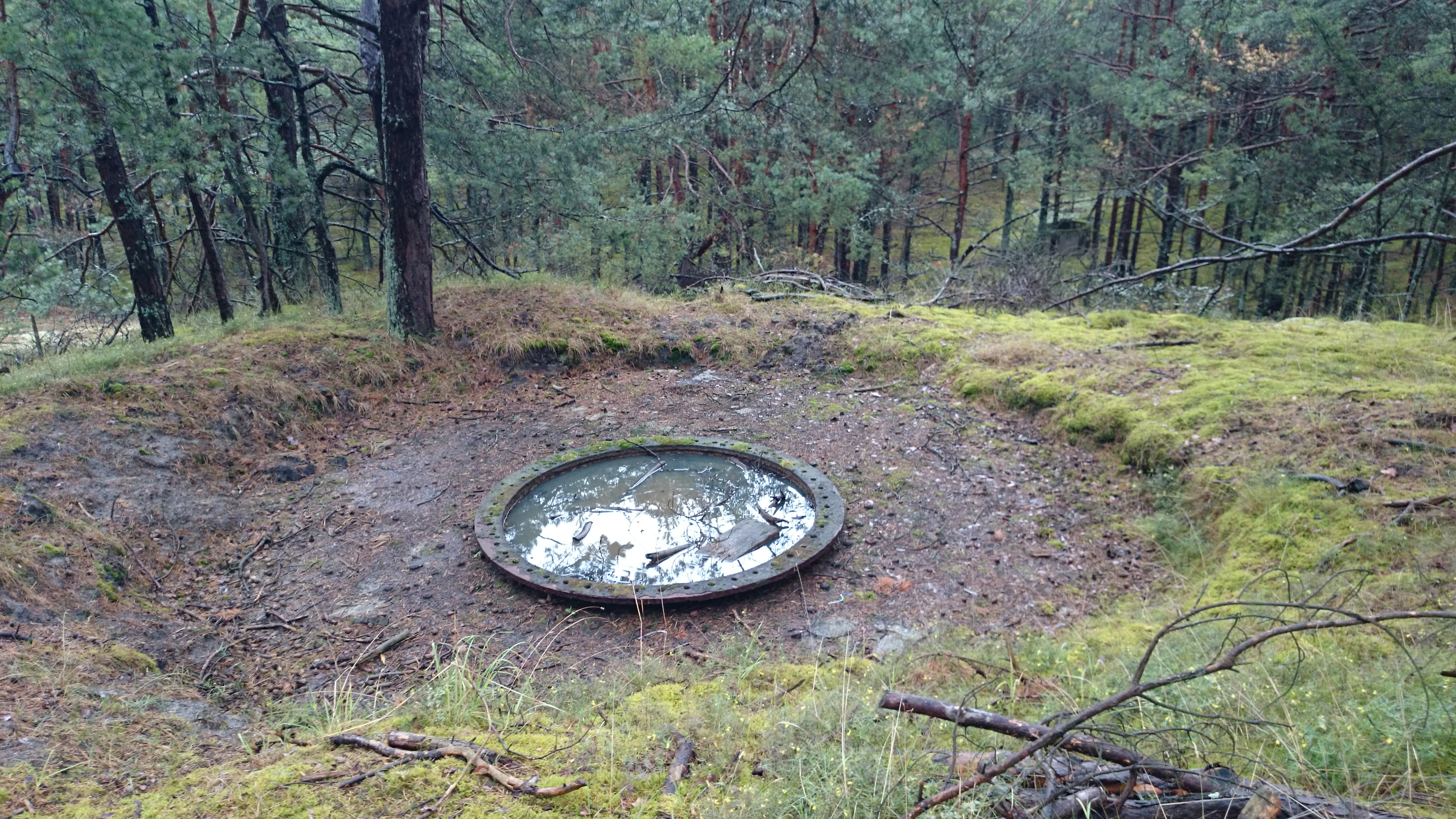 Pozostałości stanowiska zdwojonego działa 120 mm 34. baterii na półwyspie Hel.